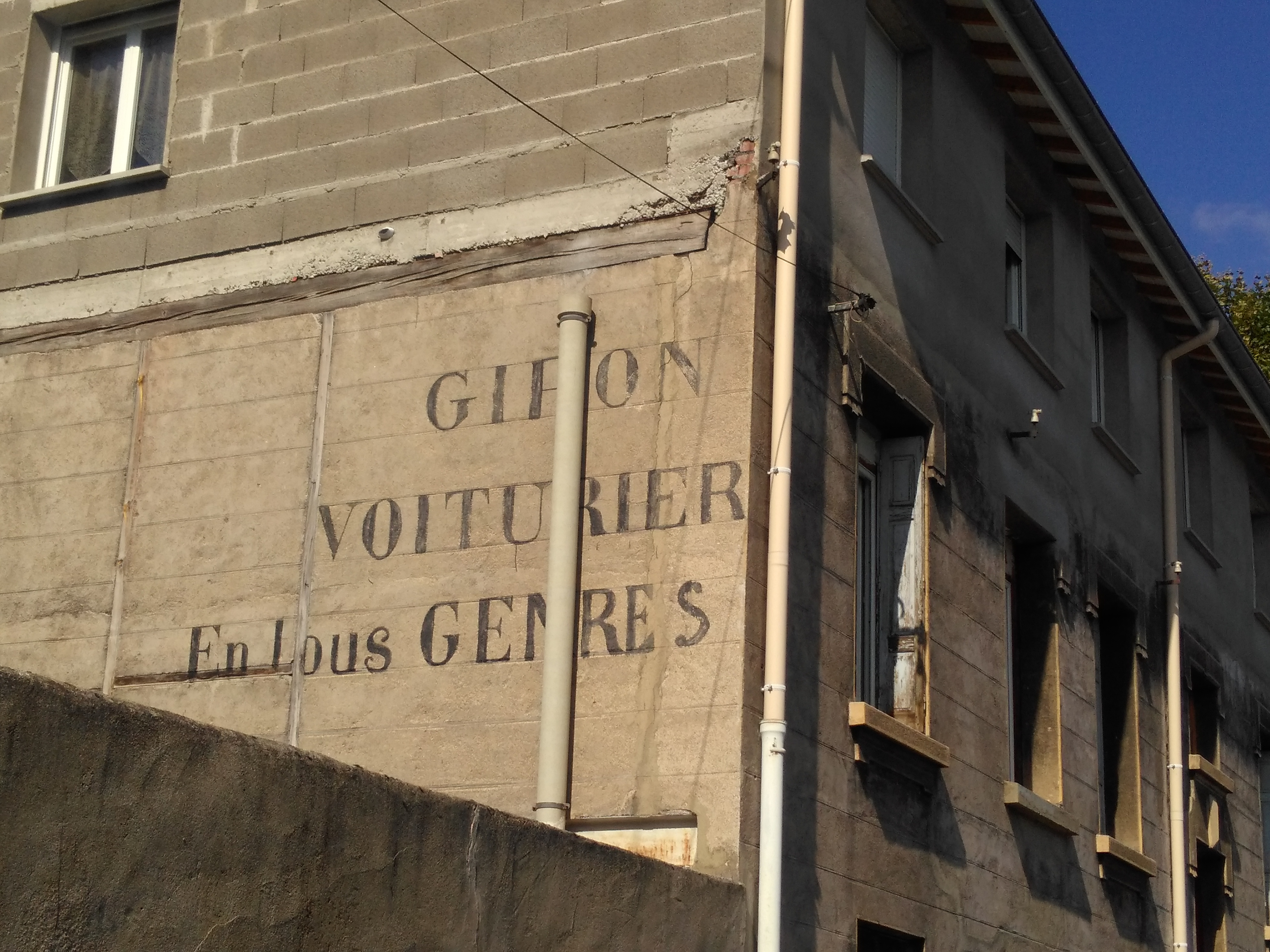 Une façade avec une publicité pour voiturier au quartier Montaud / Côte-Chaude de Saint-Étienne